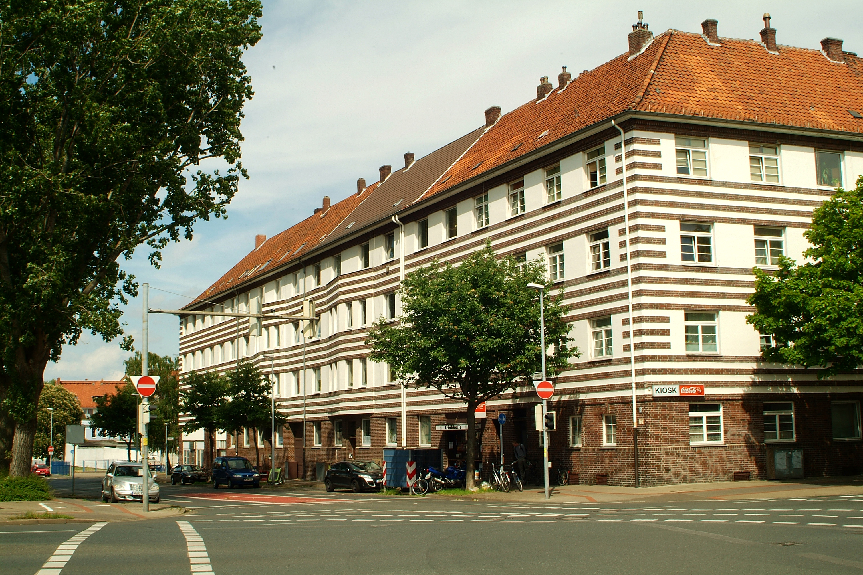 Blick in die Kesselstraße/Ecke Zimmermannstraße von der Straße Am Lindener Hafen in Hannover Limmer. In der Kesselstraße Nr. 19 (braunes Dach) wohnte der Widerstandskämfer Franz Nause.